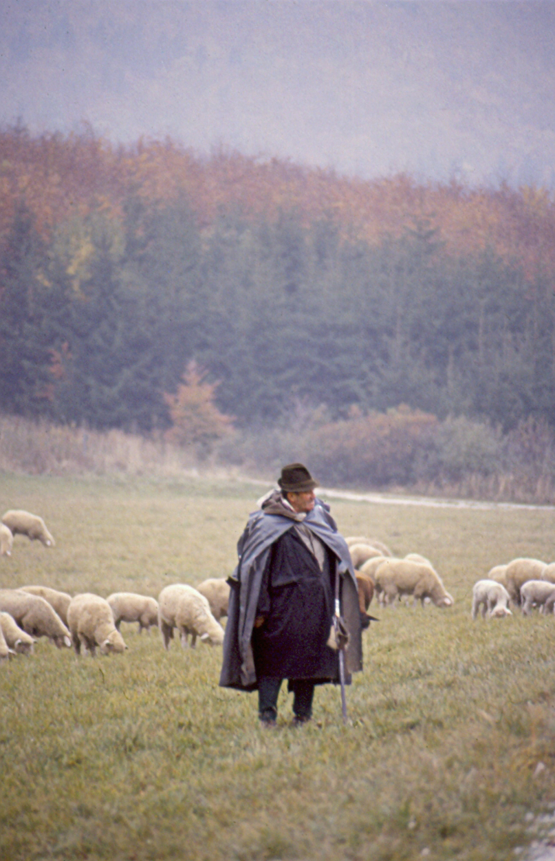 Schwäbische Alb in den 1980er-Jahren Schäfer auf der Schwäbischen Alb